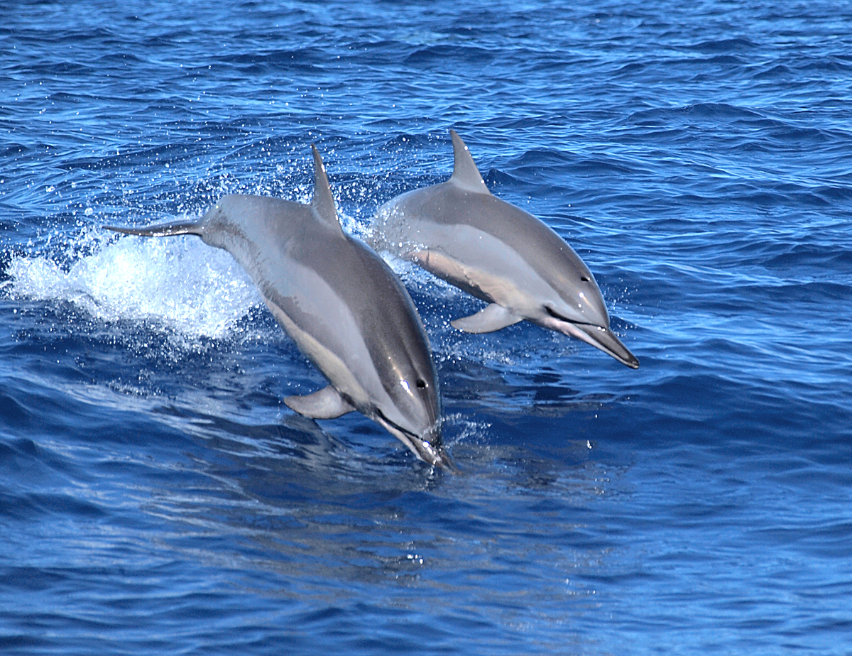 Dauphin à long bec (Stenella longirostris) à la Réunion.